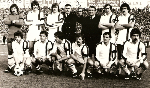 Una formazione del Taranto a fine anni 1970 (tra il 1976 e il 1979); si riconosce (in piedi, secondo da destra) Giorgio Fanti.